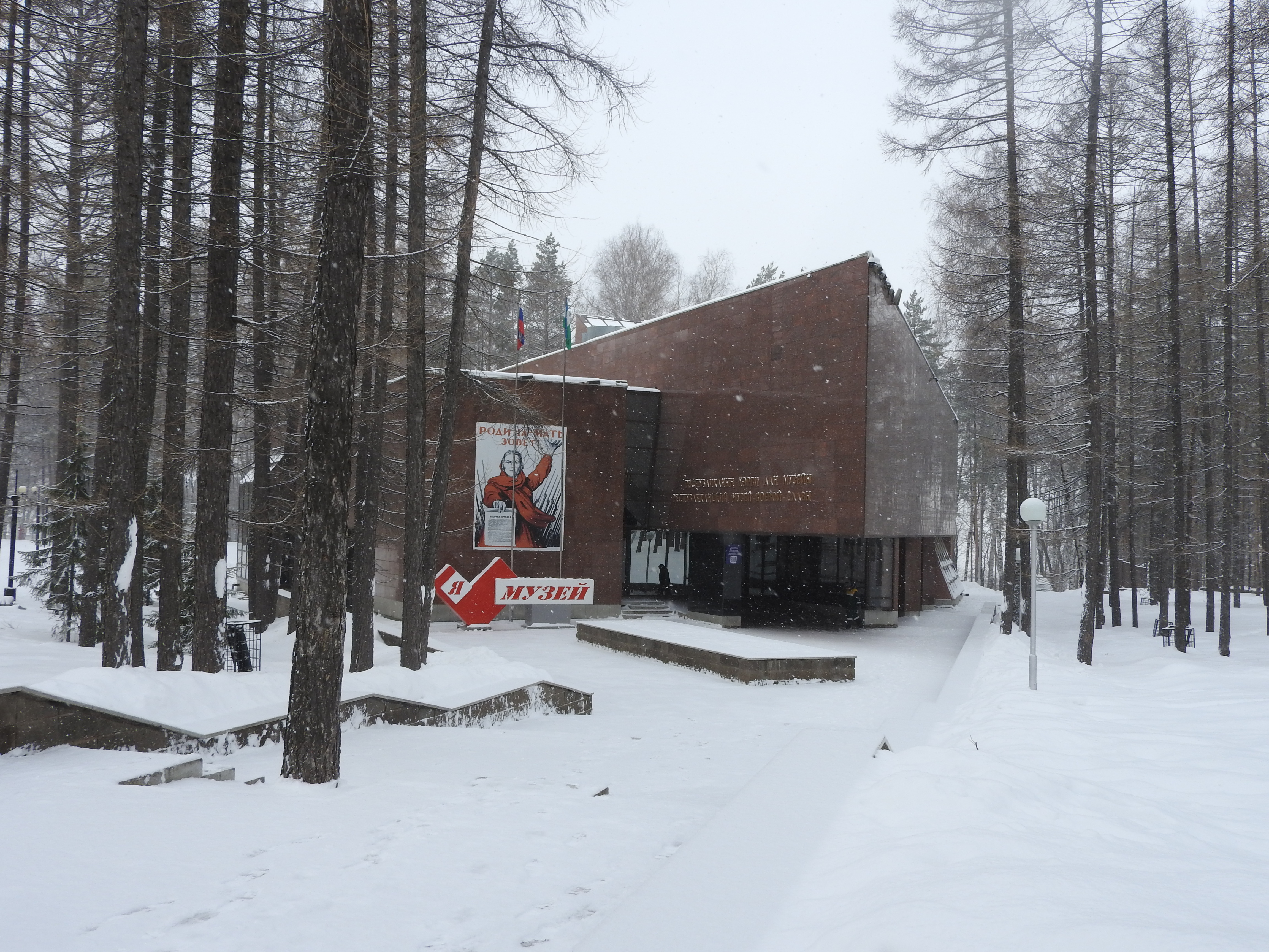 Парк Победы, Уфа